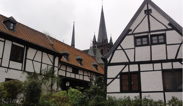 Teilansicht historische Hülser Klausur (die Kluus) vom Innenhof her, mit Kirche St. Cyriakus im Hintergrund.